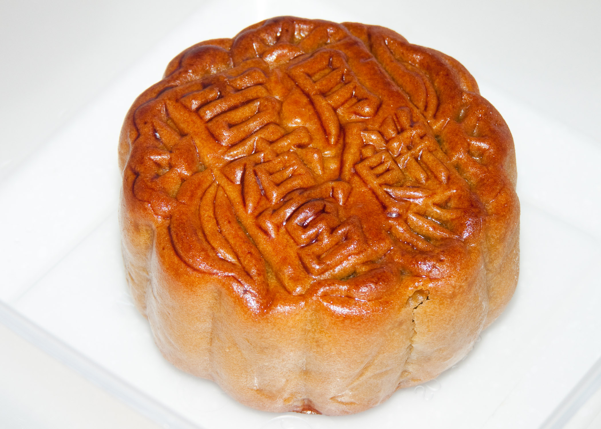 Traditionnel gâteau de lune servi pour fêter la lune. C'est la deuxième fête de l'année dans l'ordre d'importance dans le calendrier chinois.